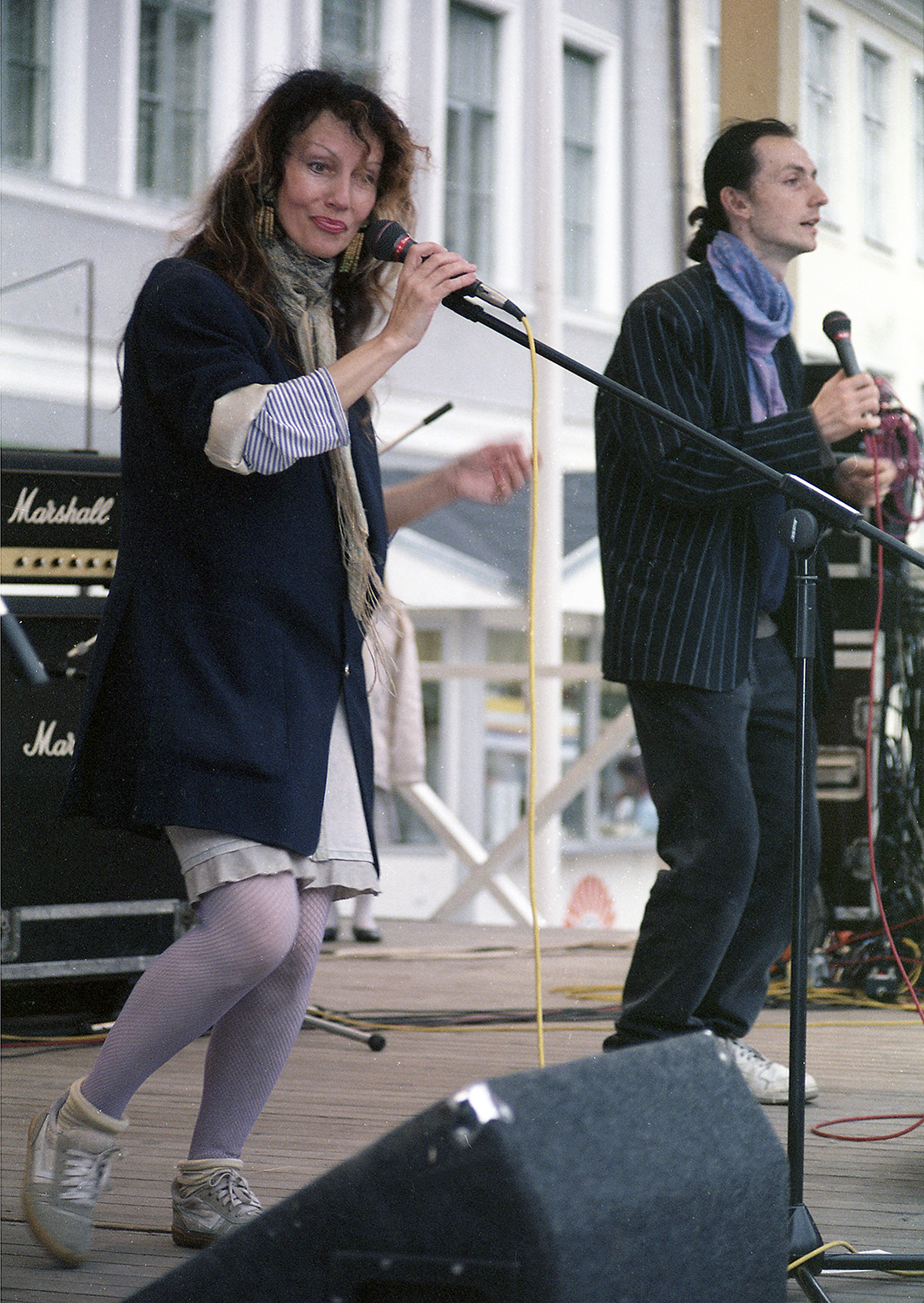 Marju Kuut ja Uku Kuut eesti muusikud Vanalinna päevadel 93